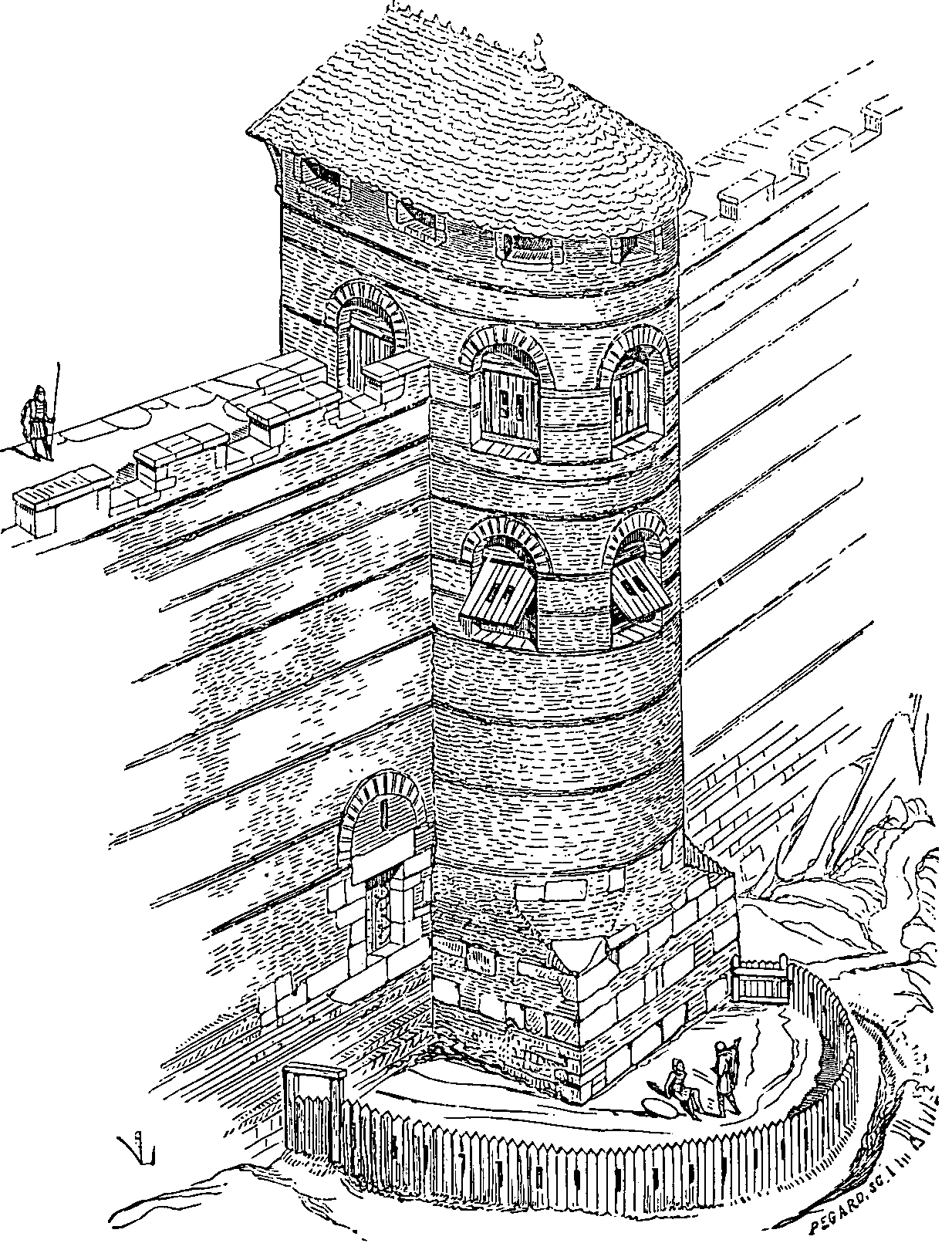 Dessin extrait de l'ouvrage La cité de Carcassonne par Eugène Viollet-le-Duc. Le dessin est intitulé : Figure N°1. Notice Gallica : Type : texte imprimé, monographie Auteur(s) : Viollet-le-Duc, Eugène-Emmanuel (1814-1879). Auteur du texte Titre(s) : La cité de Carcassonne (Aude) [Texte imprimé] / par Viollet Le Duc Publication : Paris : Librairie des imprimeries réunies, 1888 Description matérielle : 85 p. : ill. ; in-8 Sujet(s) : Carcassonne (Aude) -- Cité -- Histoire Notice n° : FRBNF36570974